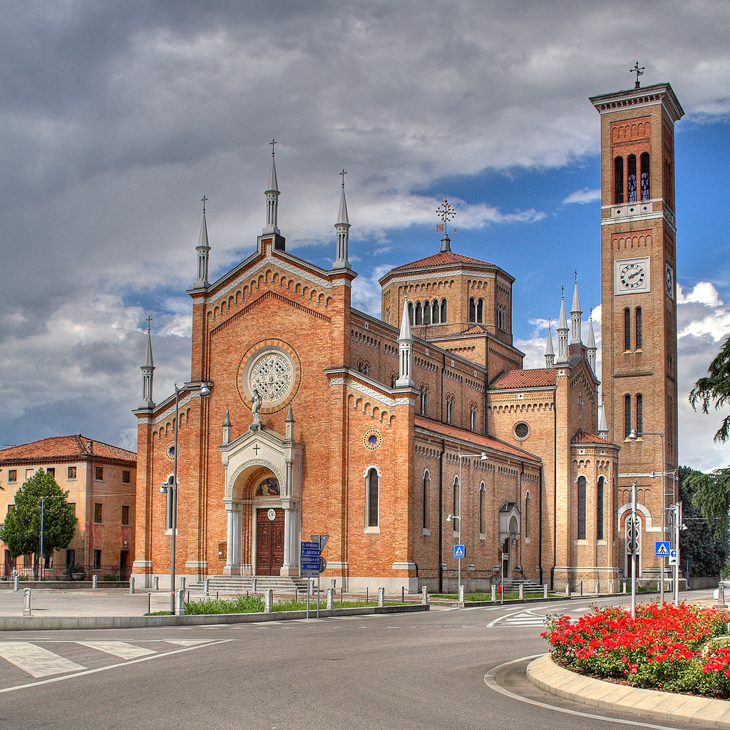 La parrocchiale di Arcade.